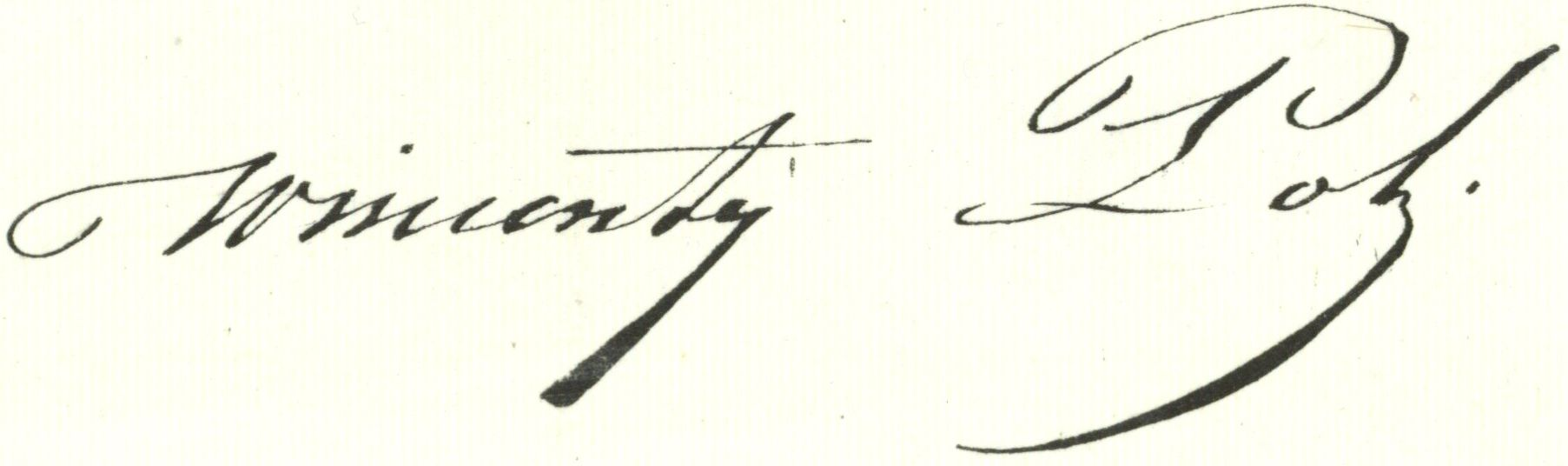 Faksymile Wincentego Pola pod ryciną Maksymiliana Fajansa.